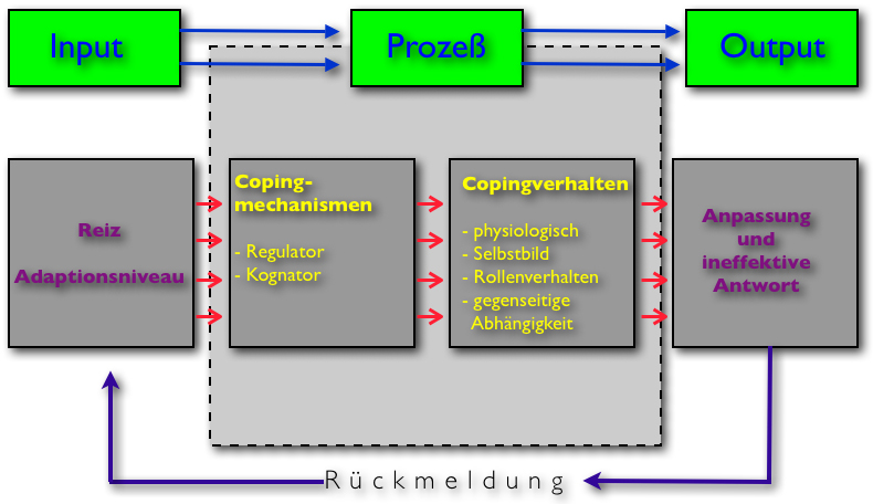 Schematische Darstellung des Anpassungsprozesses nach Callista Roy